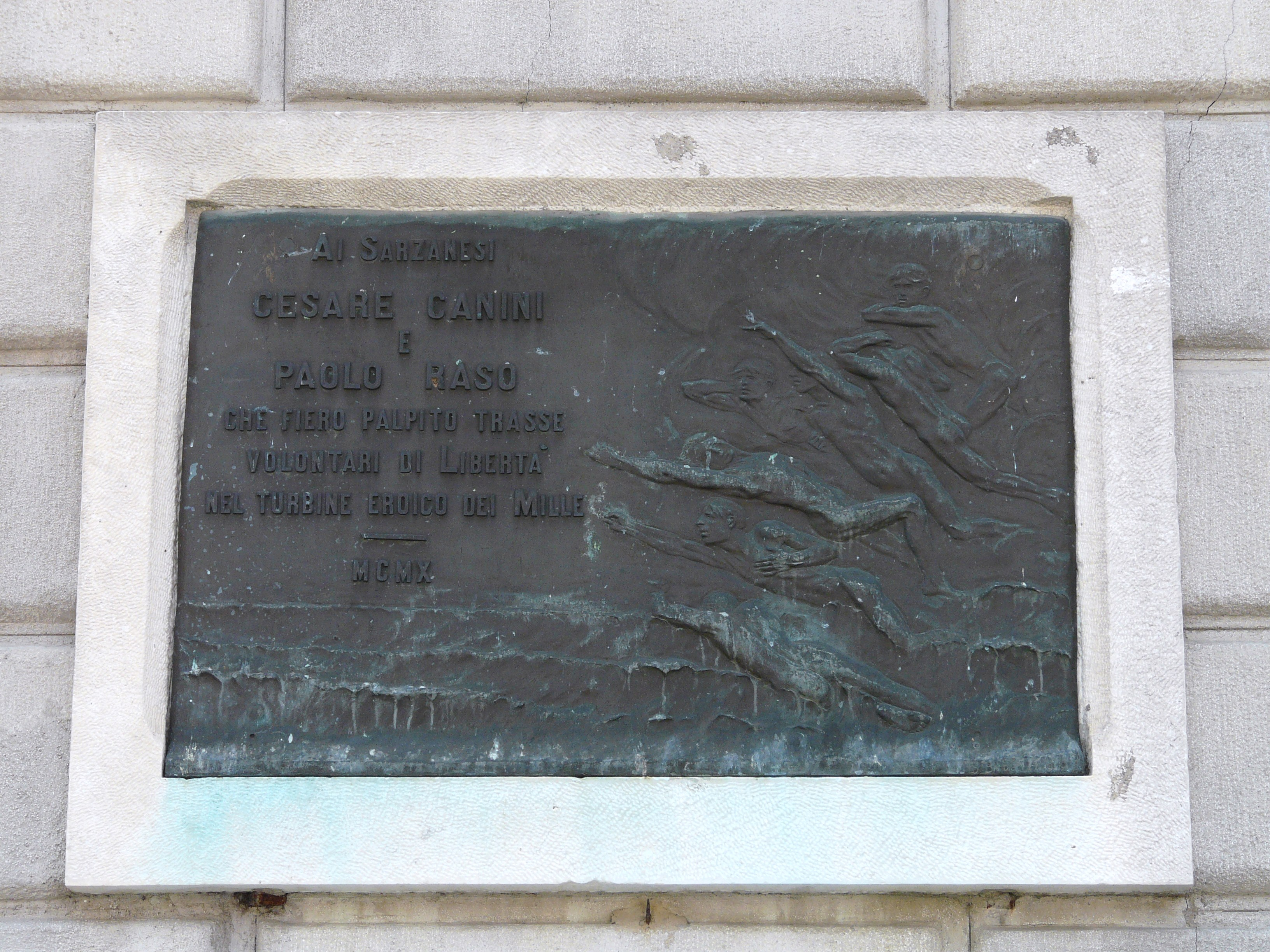 Municipio di Sarzana, Liguria, Italia